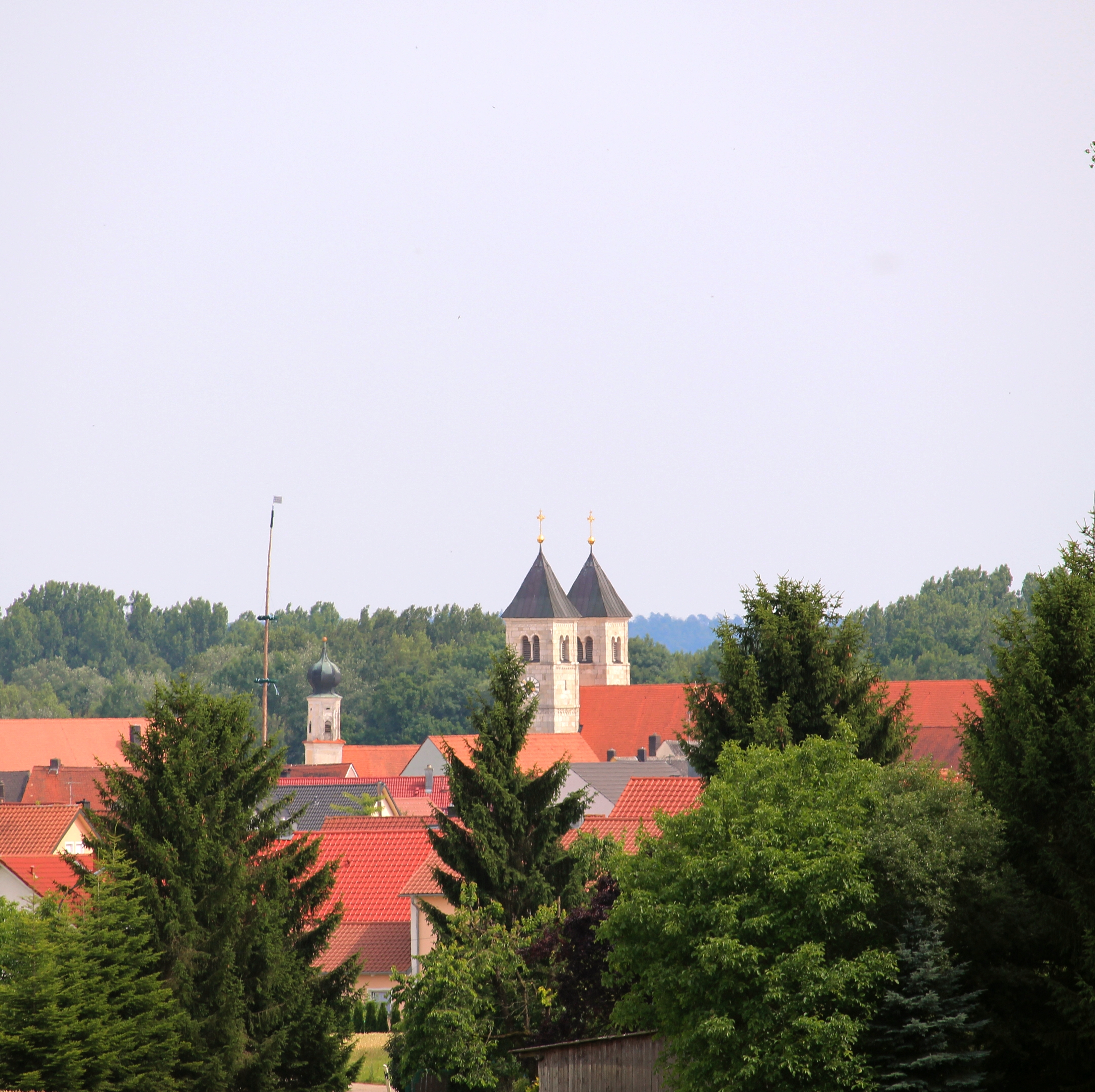 St Leonhard Pförring, Landkreis Eichstätt, Oberbayern